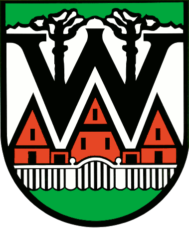 Wappen von Wilhelmshorst